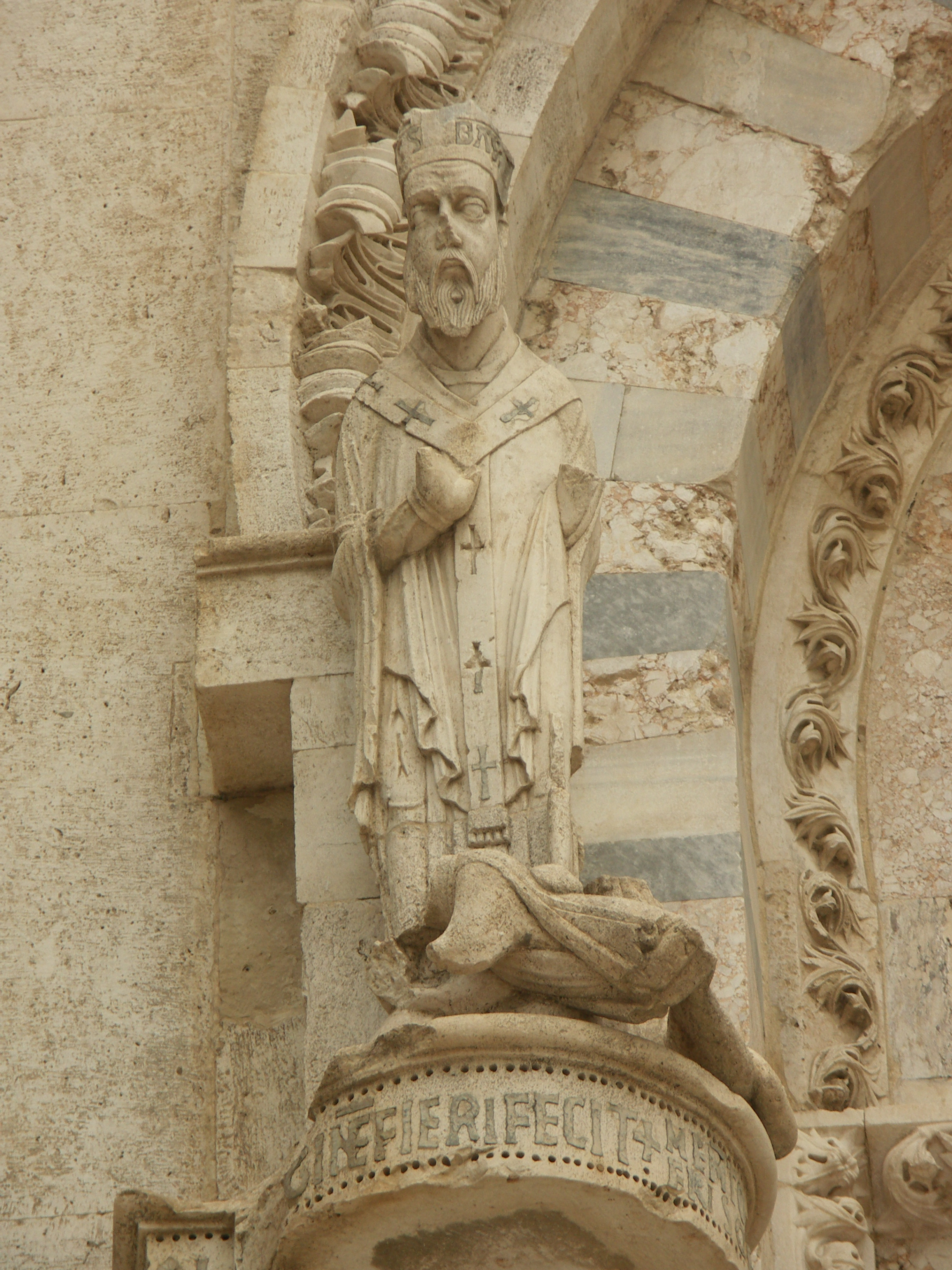 Statua del vescovo Basso nel portale della cattedrale di Termoli